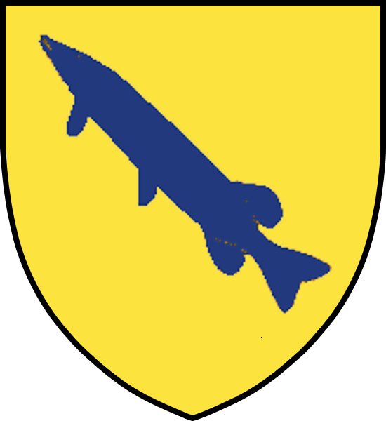 Vapensköld för introducerade ätten Gedda 2168